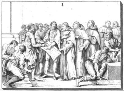 Dessin du modèle du bas-relief de la porte d'entrée du couvent des Feuillants.